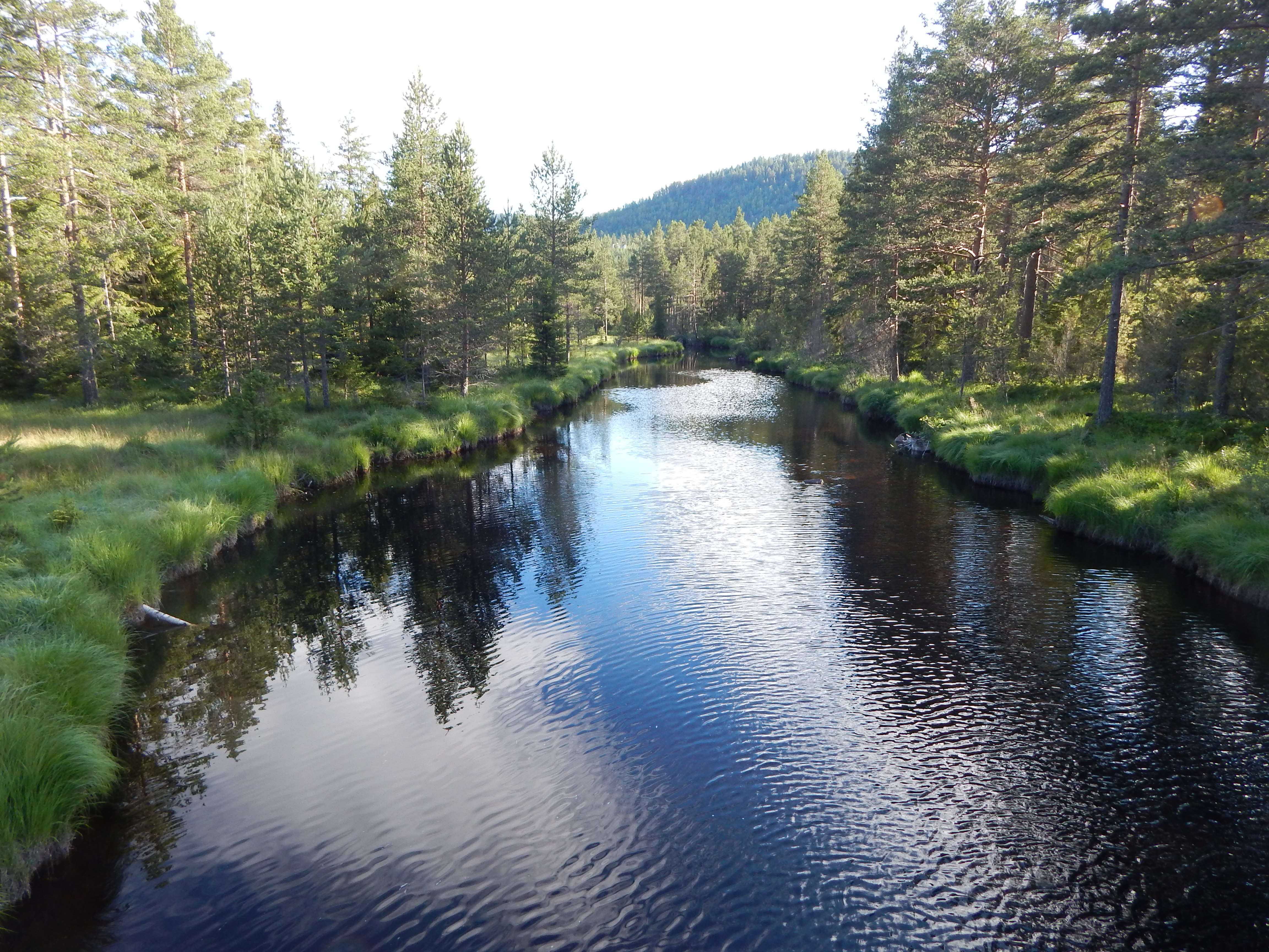 Jondalselva oppstrøms fra Løka bru